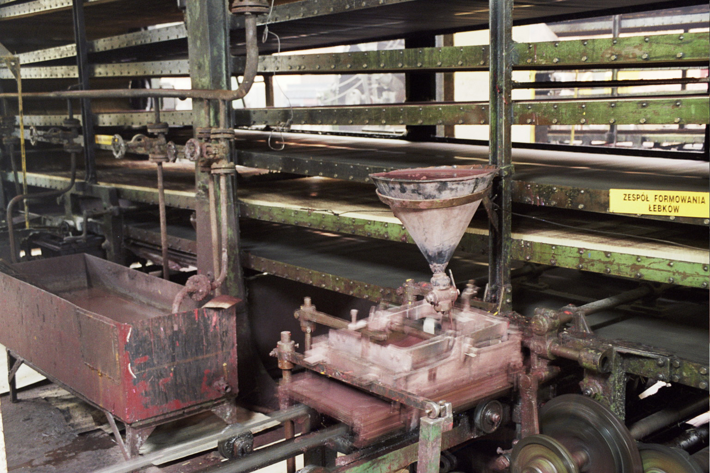 Muzeum produkcji zapałek w Częstochowie - masa zapałczana Author: Przykuta Date: december 2005